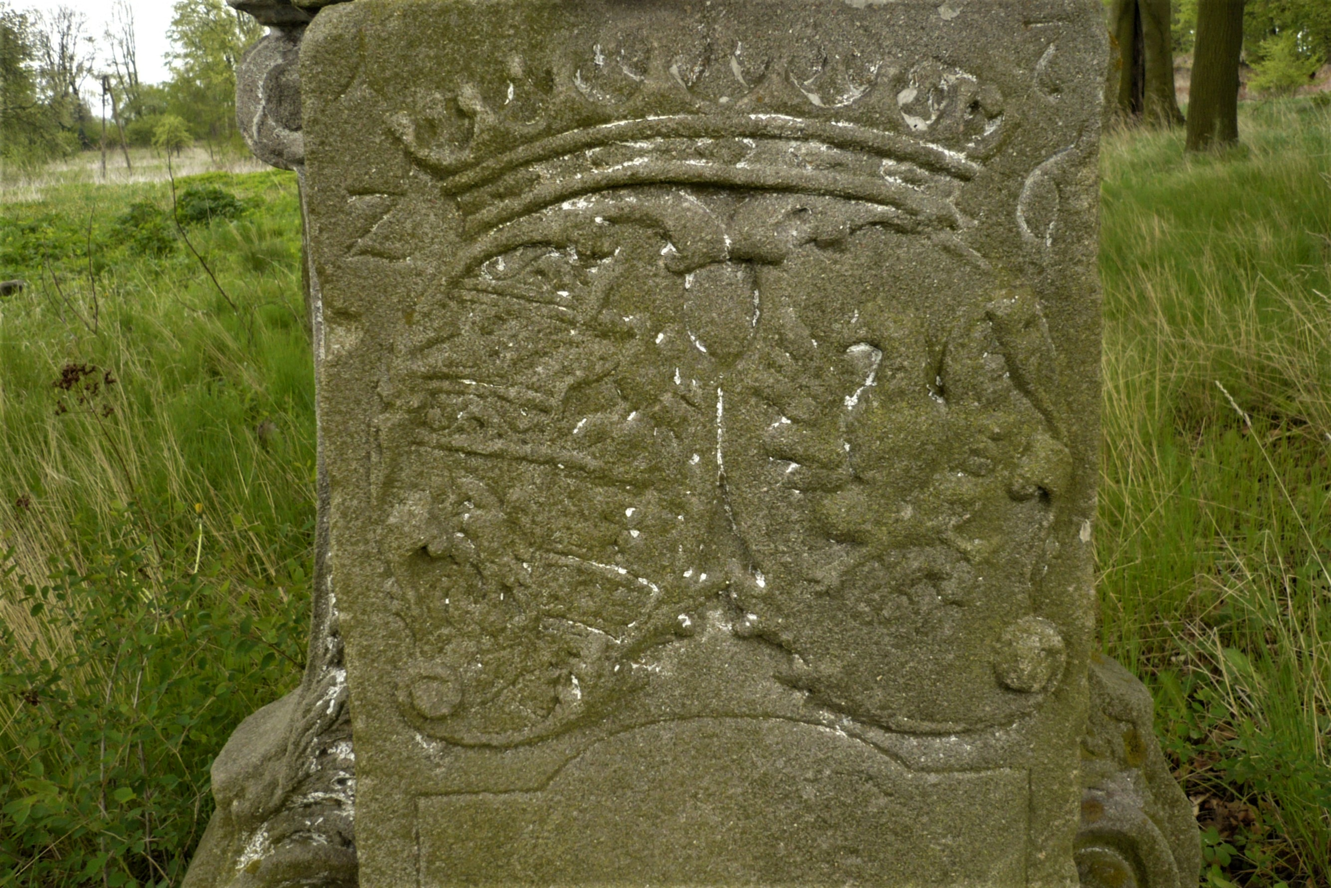 Nepomucen w Korytowie. Herby